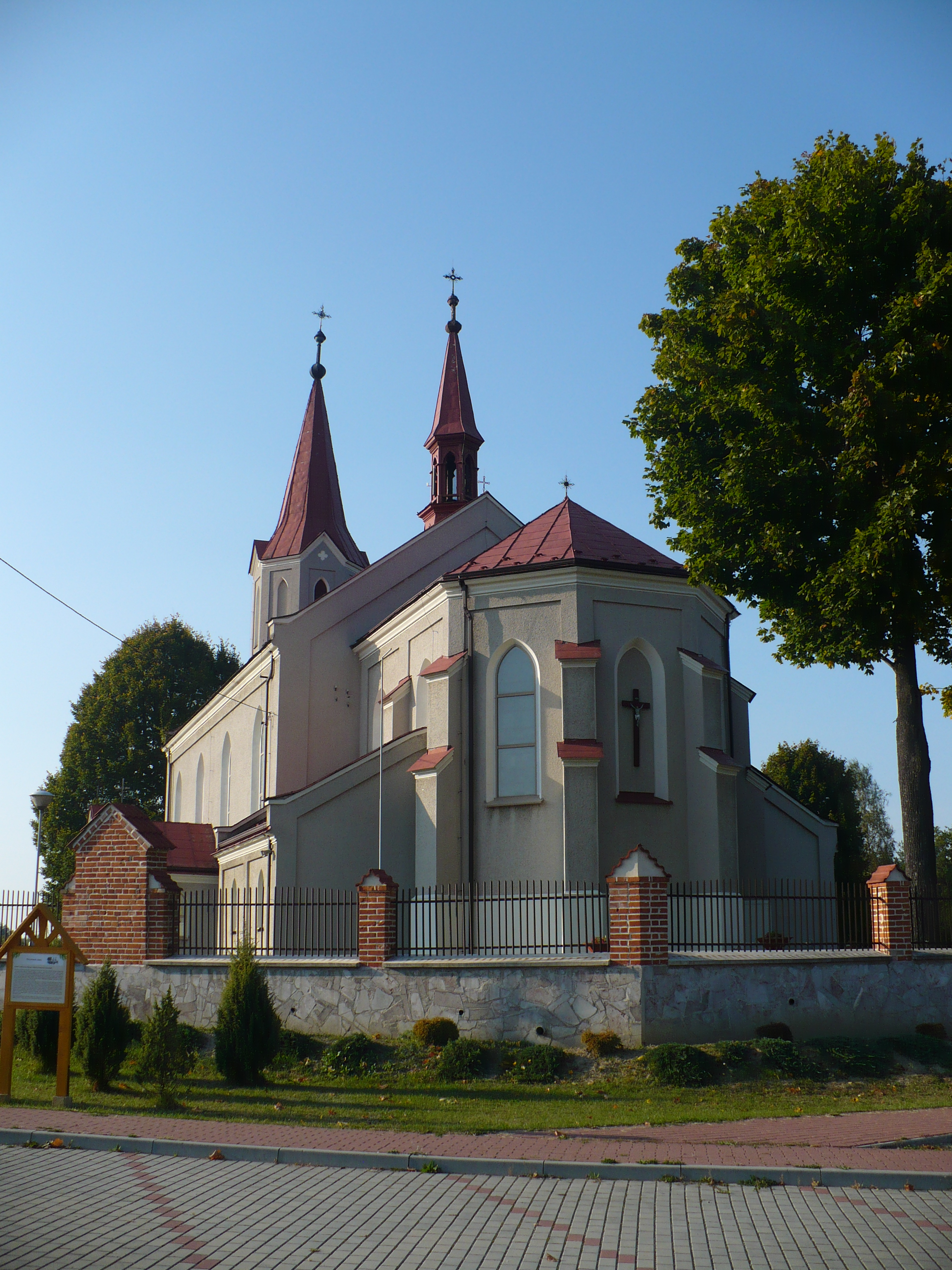 Kościół w Ostrowach Tuszowskich, widok od strony ulicy